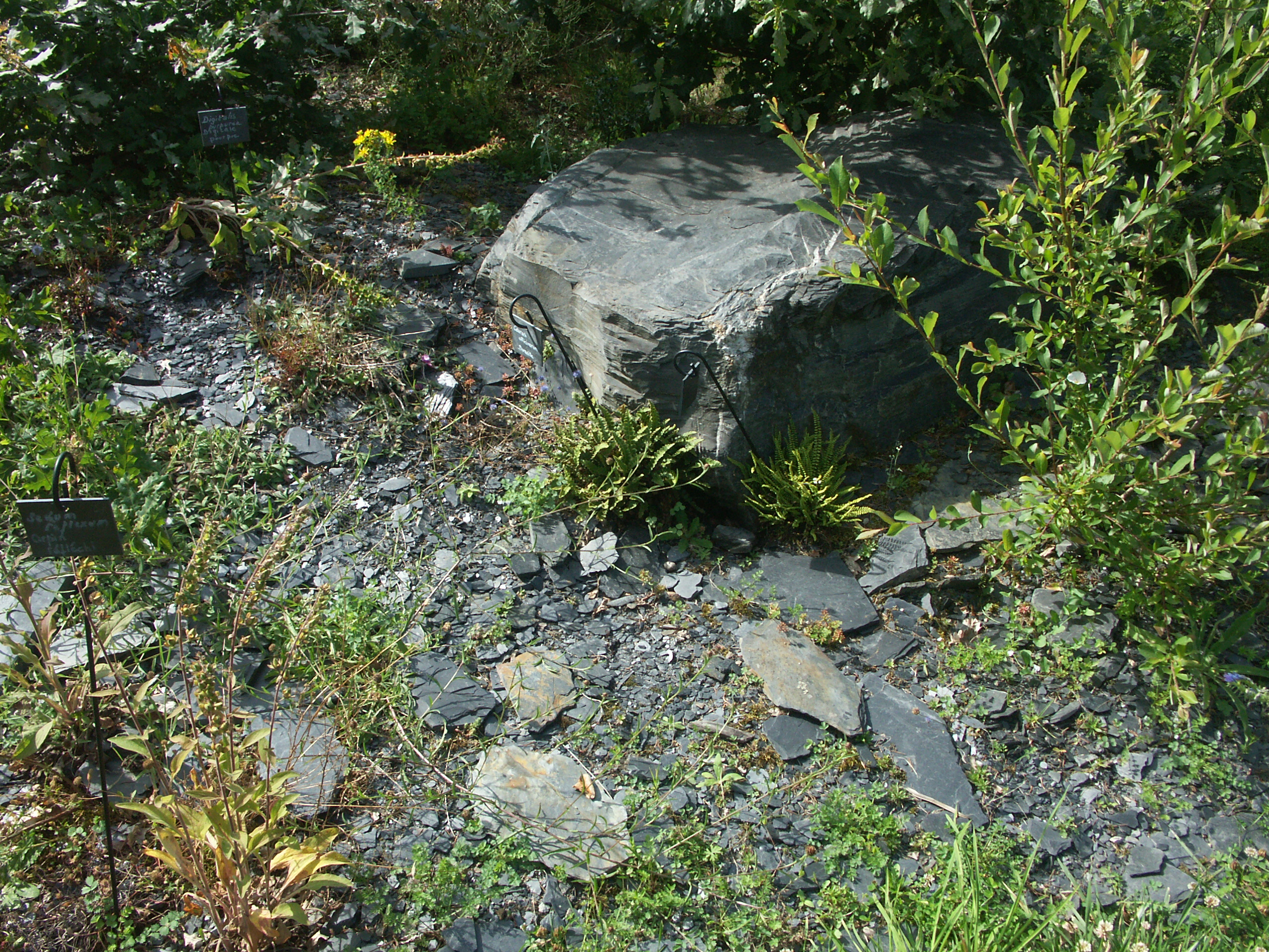 Schiste ardoisier à l'arboretum Gaston Allard